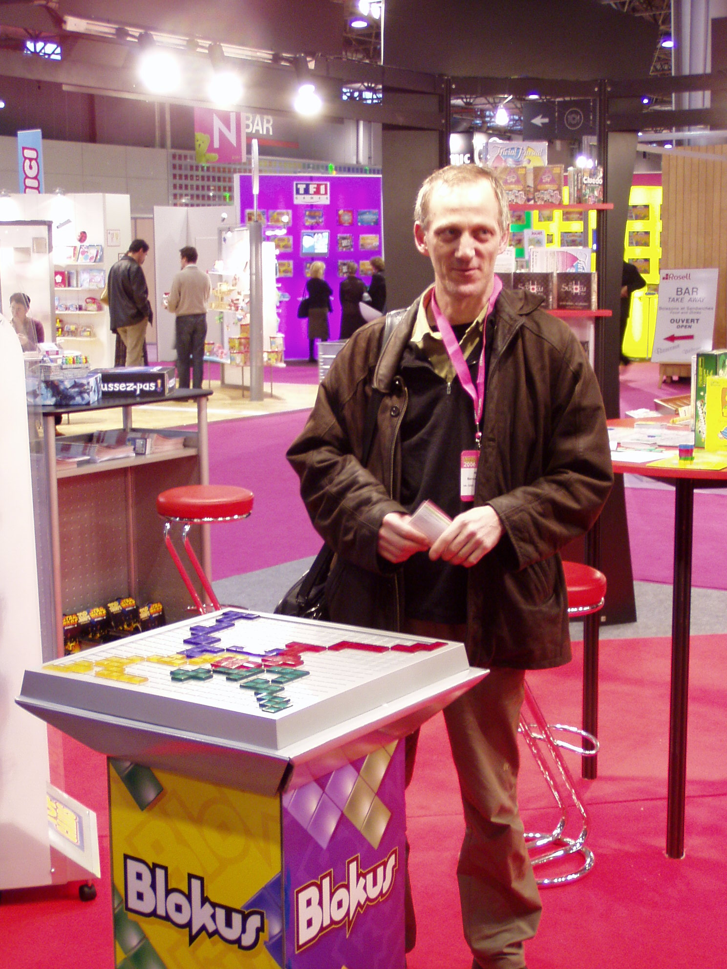 Photo réalisée par François haffner au salon Univers d'enfants 2006